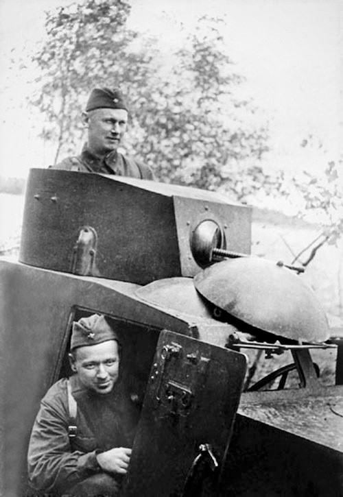 Писатели Михаил Шолохов (на месте водителя бронеавтомобиля ФАИ) и Александр Фадеев (на месте башенного стрелка). Западный фронт